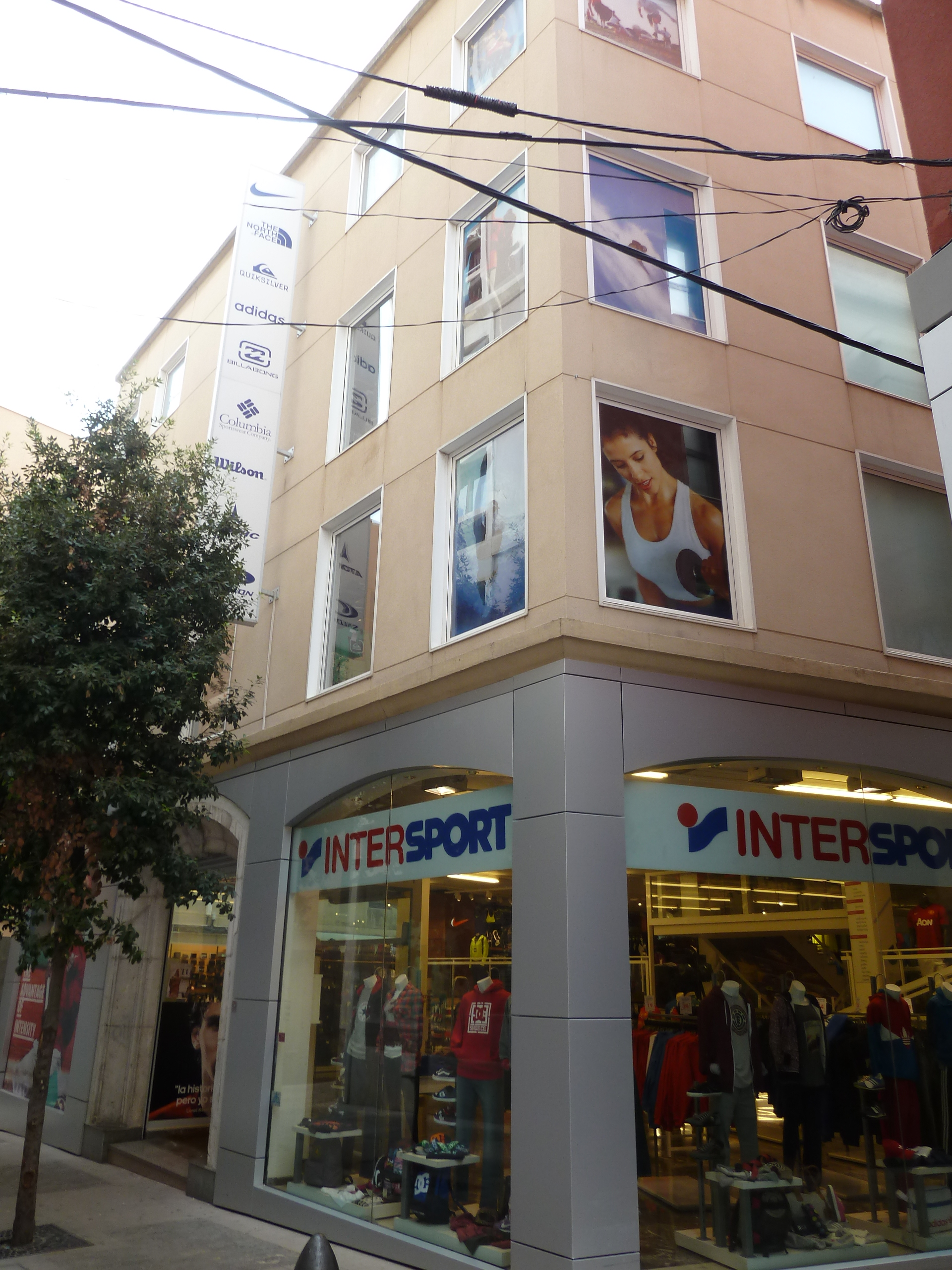 Reus